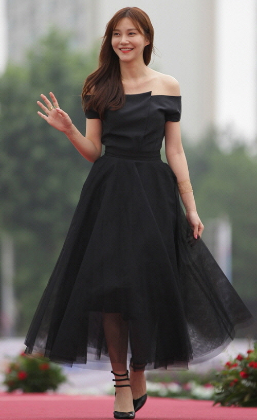 제19회 부천국제판타스틱영화제 폐막식 레드카펫